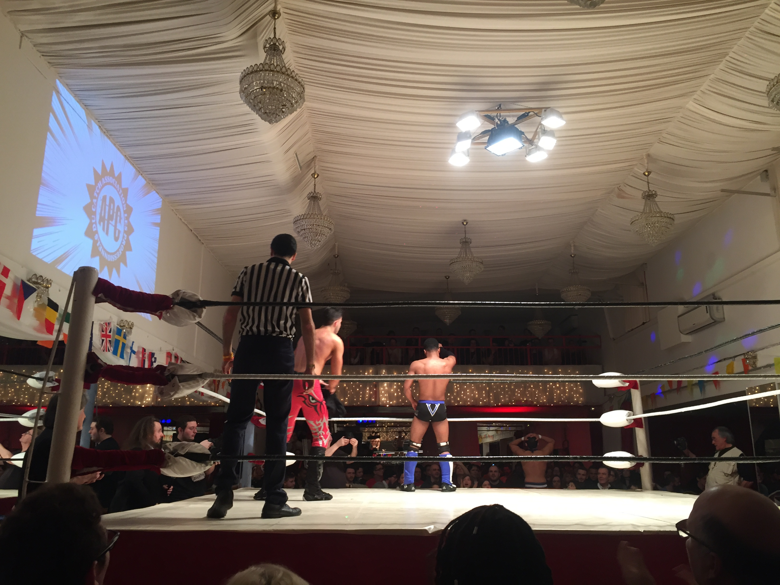 APC Catch SuperClash II